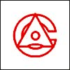 map